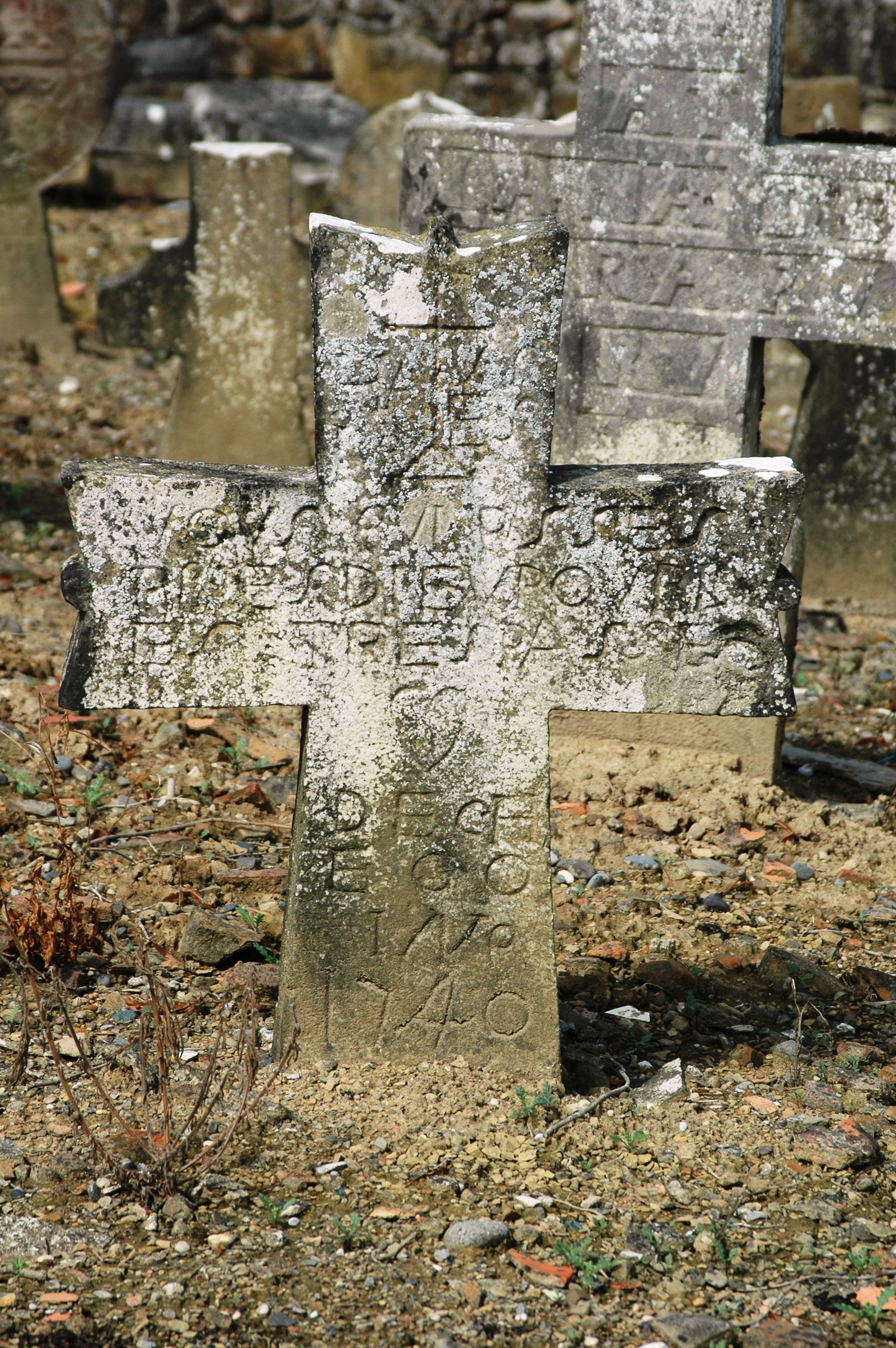 Masparraute, stèle basque de 1740